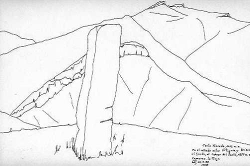 Menhir en puerto Peña Hincada (La Rioja-España) Dibujo de Ernesto Reiner Copyright: Ernesto Reiner Imagen:Peña Hincada.jpg Peña Hincada